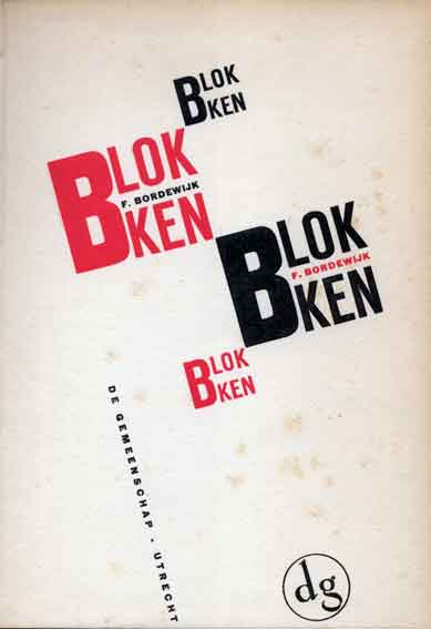 Omslag van de roman Blokken van de Nederlandse schrijver F. Bordewijk, Uitgeverij De Gemeenschap, Utrecht. Het ontwerp is in 1931 gemaakt door Andries Oosterbaan (1882-1935). Zie Lex van de Haterd: 'Van boekbinder tot grafisch vormgever'. In: Zacht Lawijd, 3: 1 (2003)